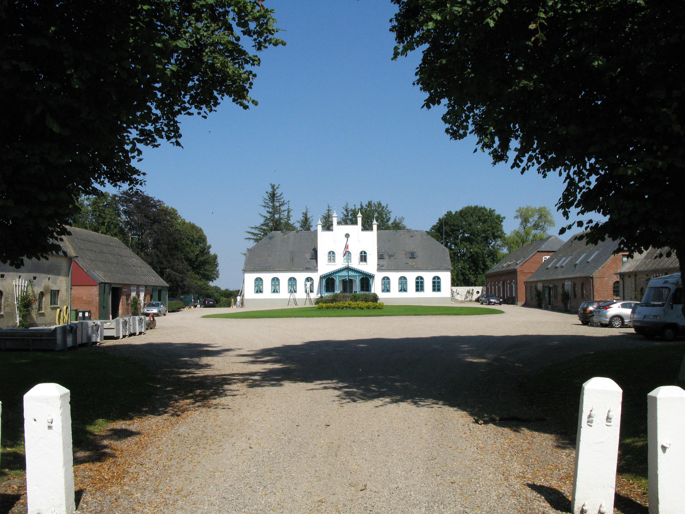 Philipsthal, Hofraum